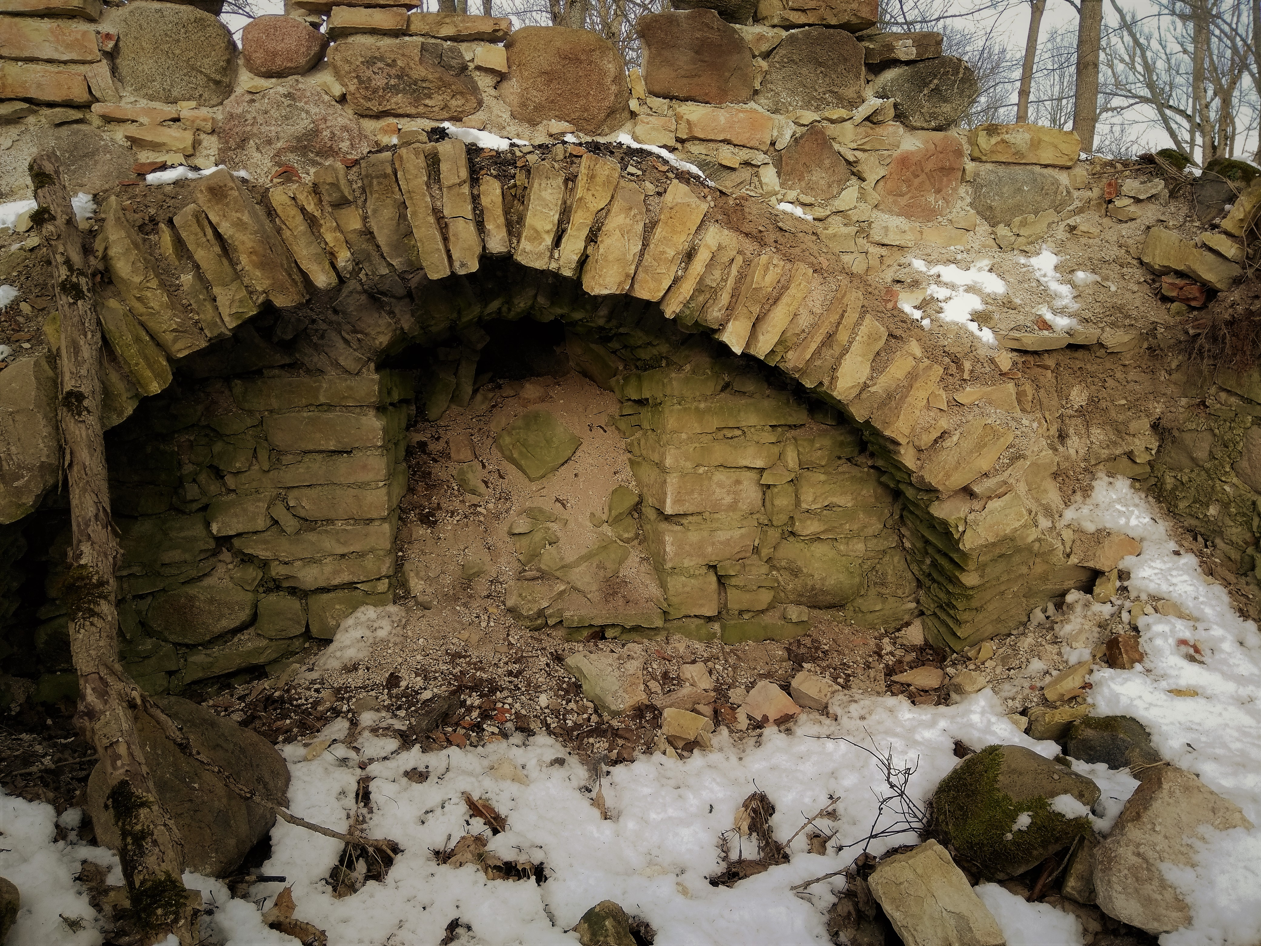 Vaade Paadremaa mõisa peahoone soklikorruse loodekülje ristvõlvi jäänustele. Vaade kirdesse. Sookalda küla